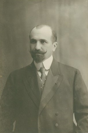 Снимка на инж. Златан Бръчков (кмет на Варна 1922 г.).